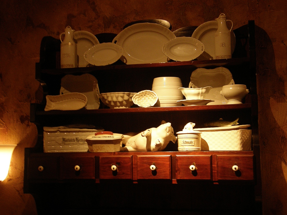 Pico, ein Altdeutscher Schäferhund † Mai 2010